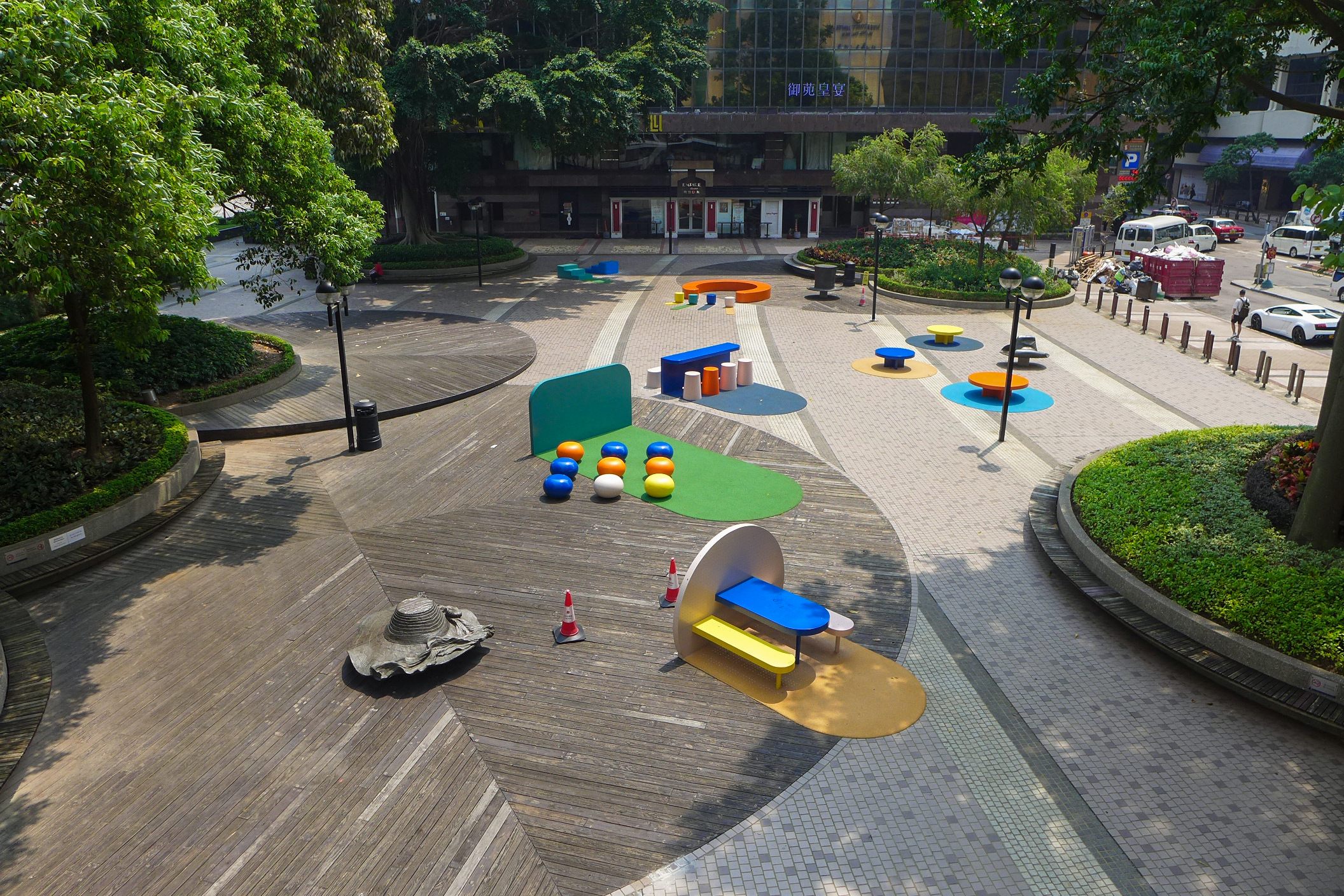 Mody Road Park